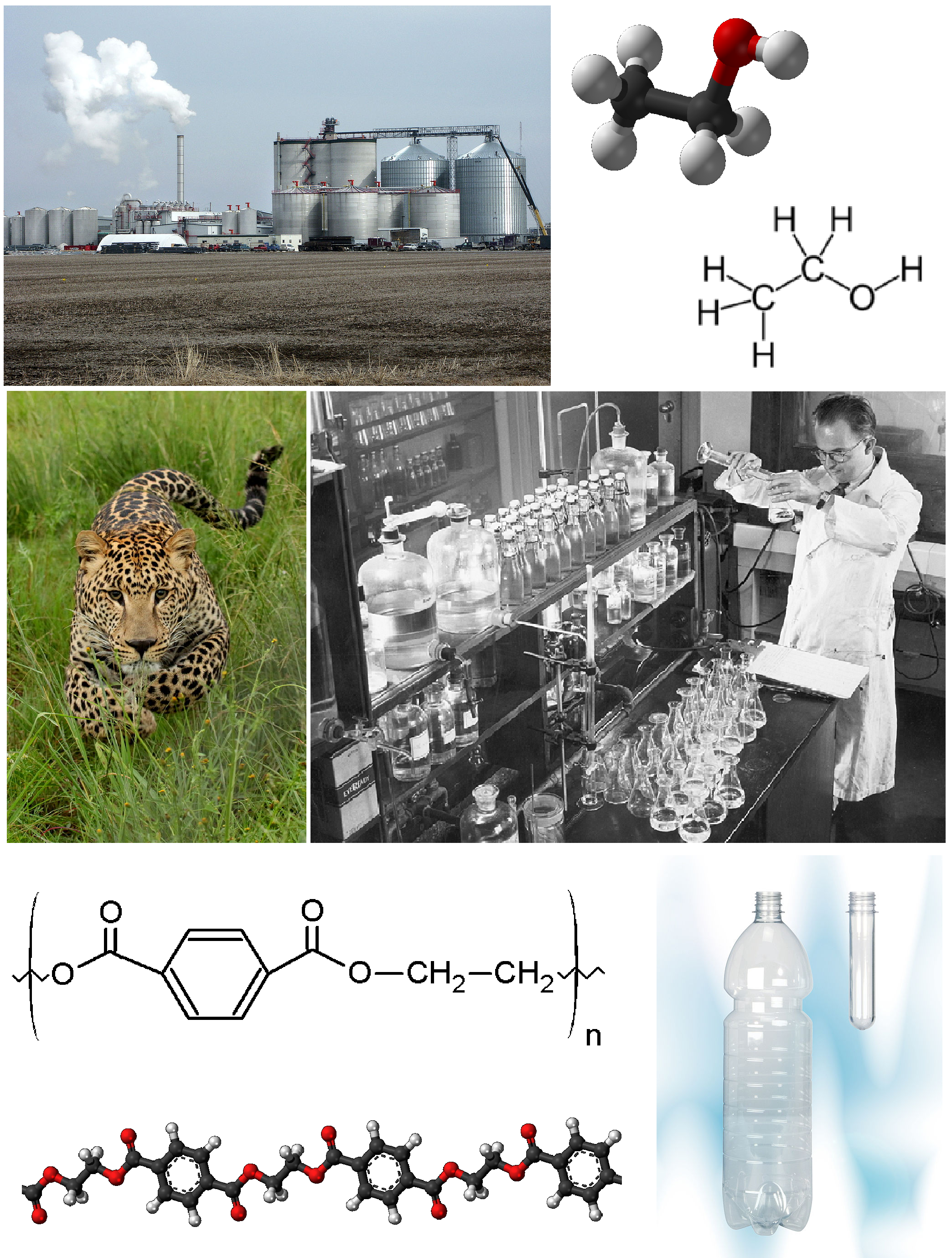 Montagem de aspectos da química orgânica. De cima para baixo, em sentido horário: fábrica de álcool etílico; fórmula do etanol (álcool etílico); químico em seu laboratório; garrafa PET; fórmula do tereftalato de polietileno (PET); uma onça pintada, composta como toda a vida por compostos de carbono.